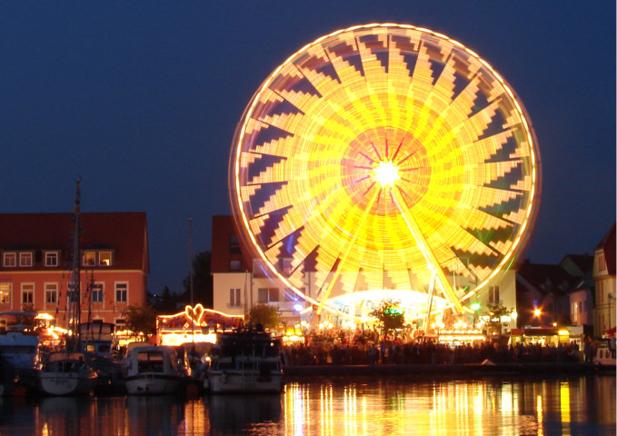 Panorama bei Nacht.